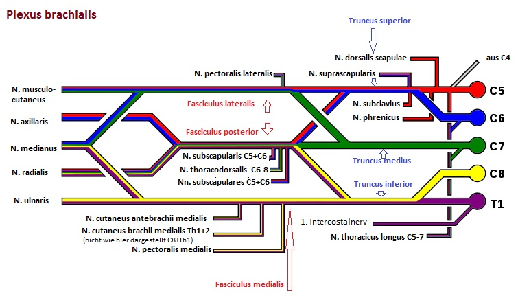 Plexus brachialis: Schematische Darstellung